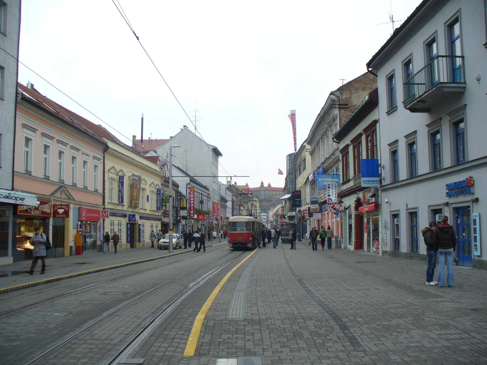 Bratislava - ulica Obchodna